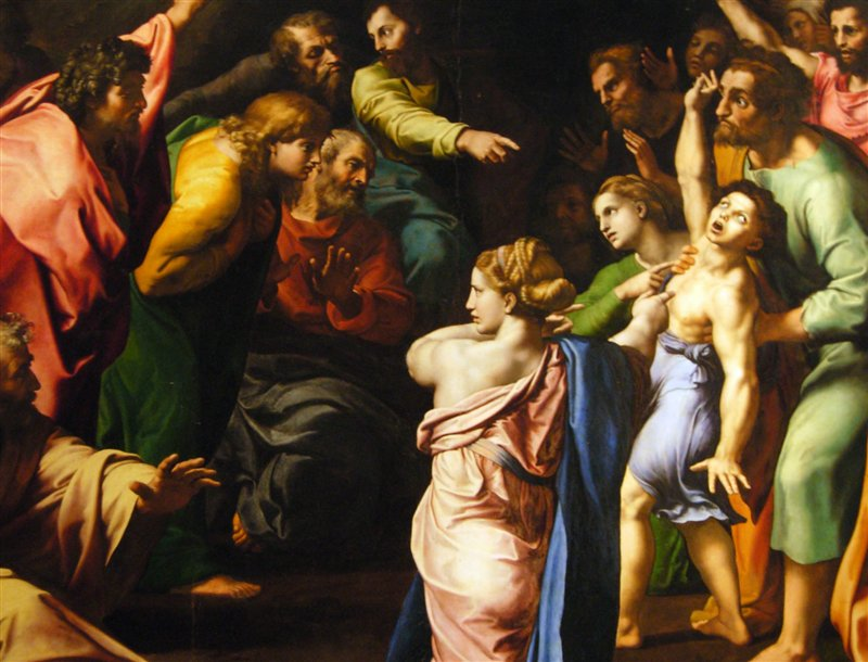 Vatican Museum Pinacoteca